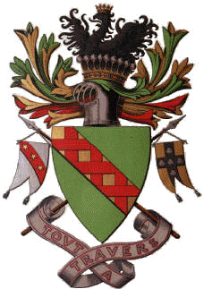 blason La Forest Divonne